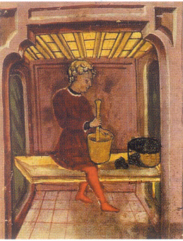 imagen de boticario